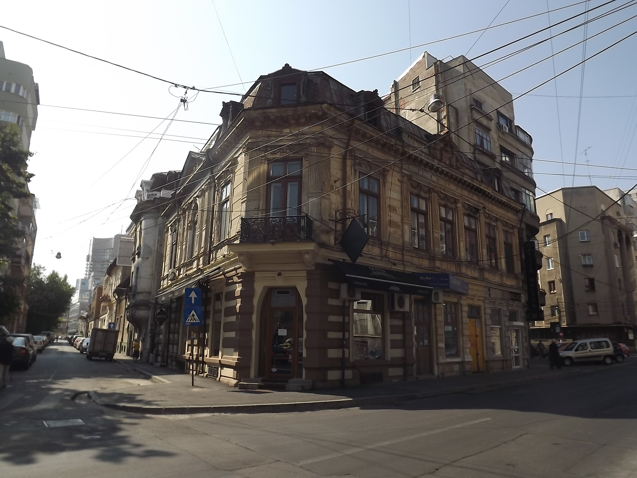 Imobil